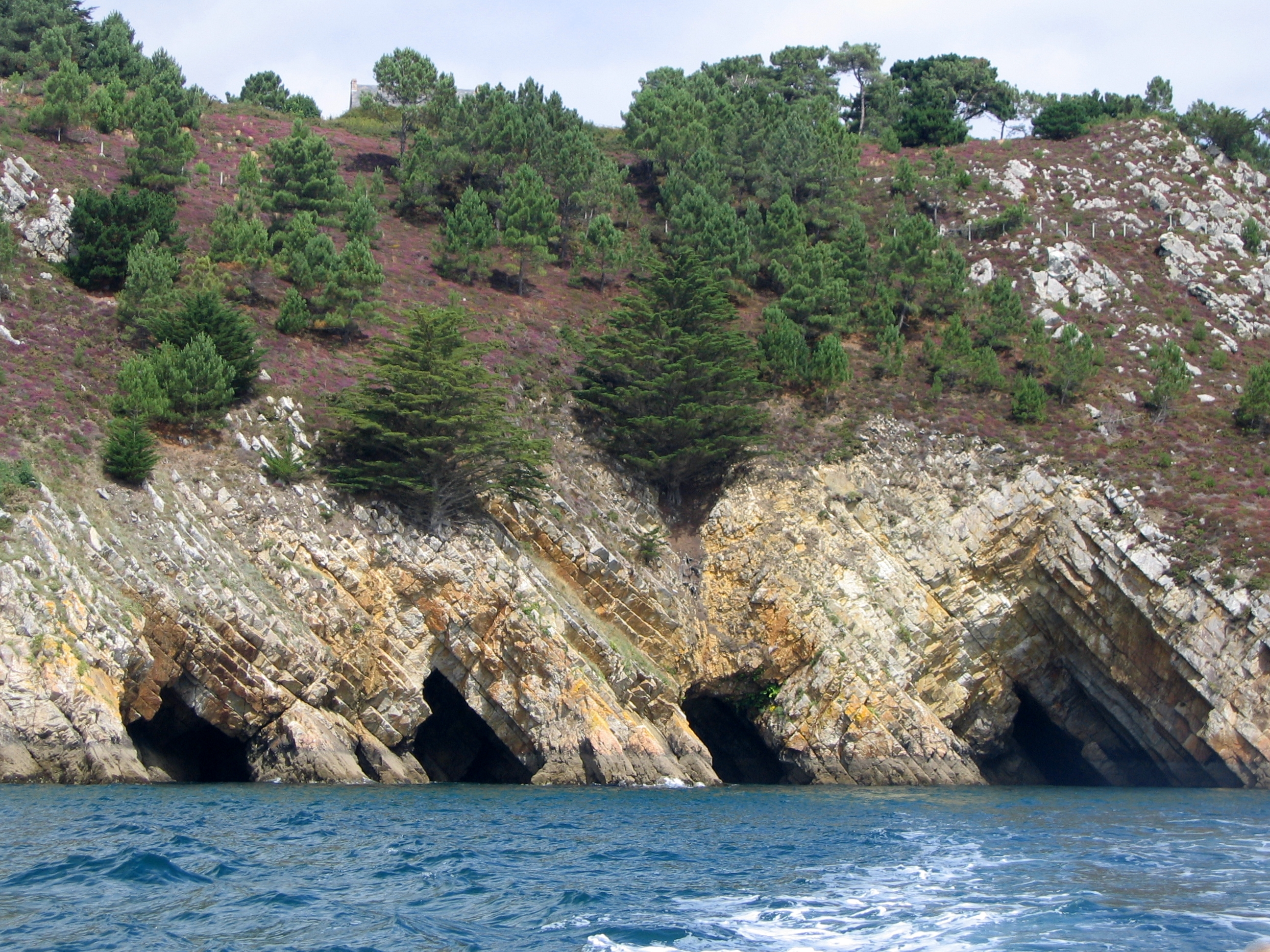 Visite en bateau des grottes de Morgat.